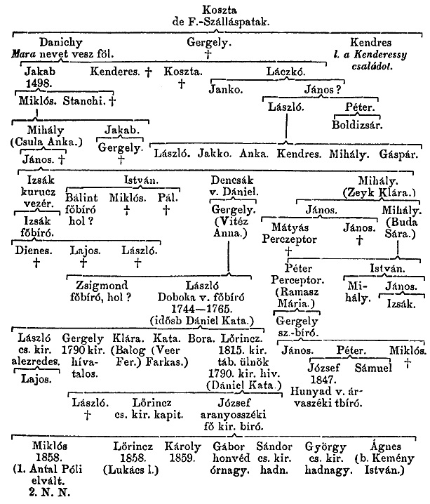 Mara Családfa ágrajza